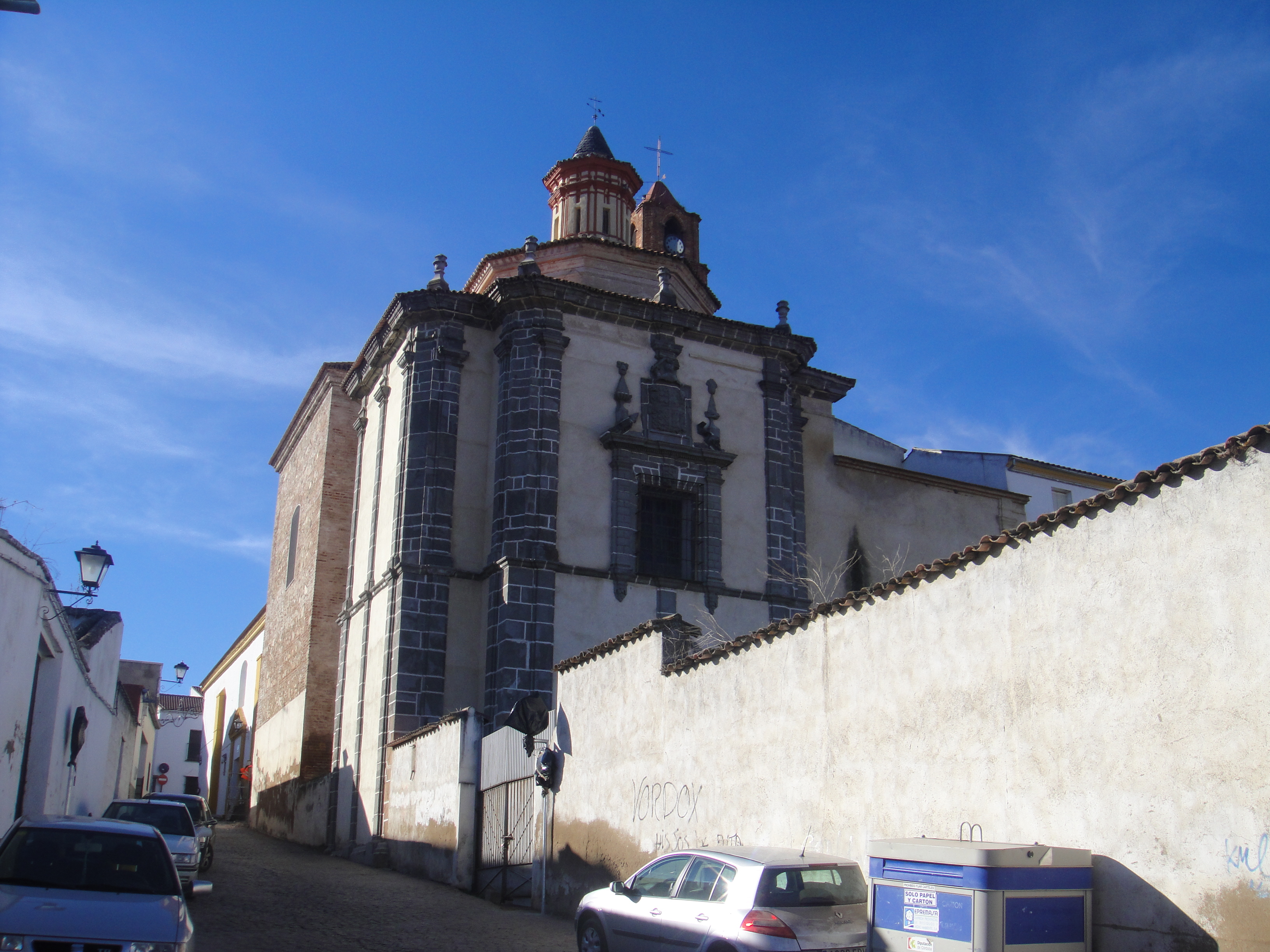 Exterior de la iglesia de San Francisco de Fuente Obejuna, provincia de Córdoba, (España).